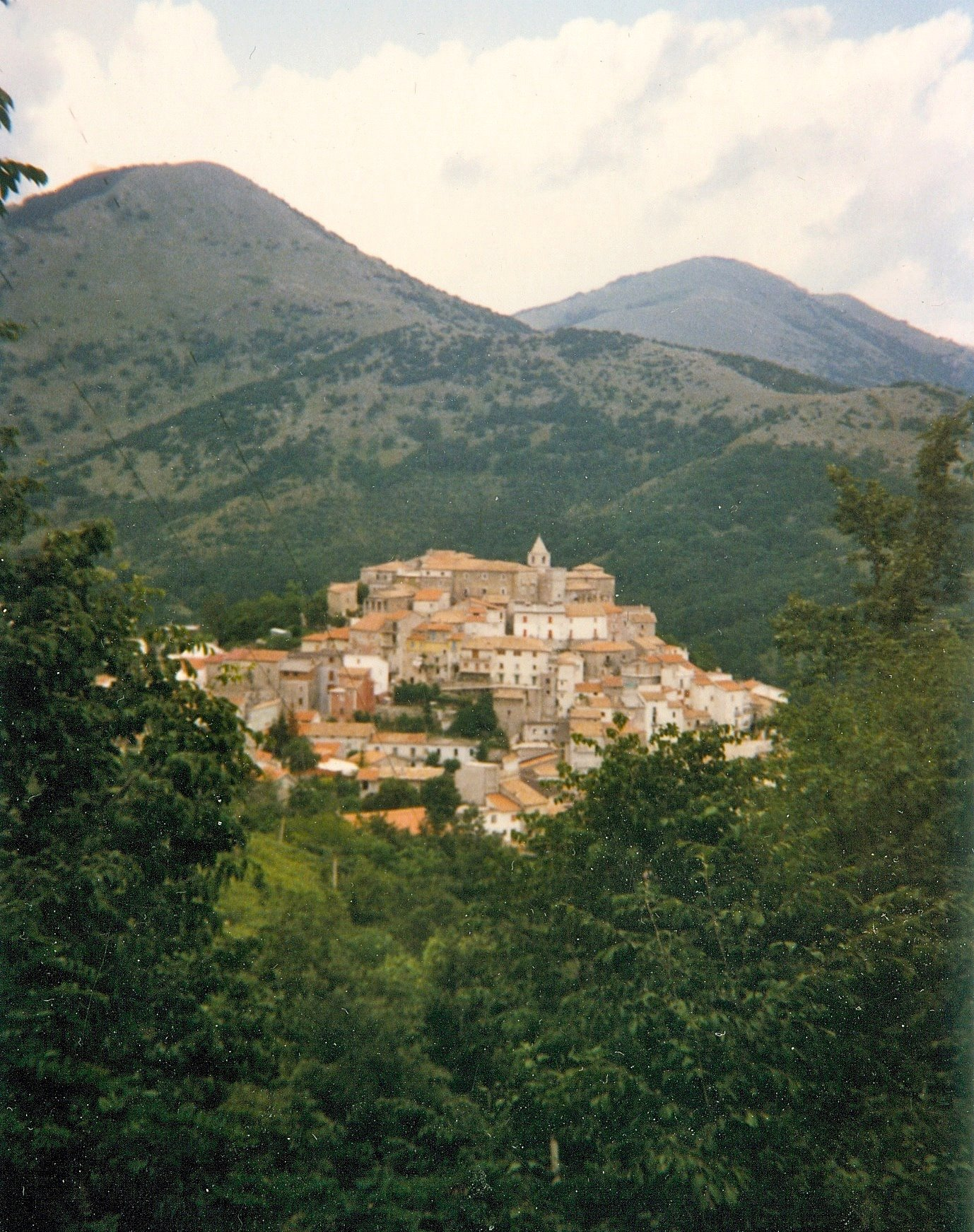 Panorama estivo di Acquafondata, foto degli anni 80